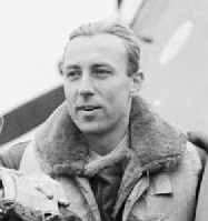 Zdzisław Henneberg